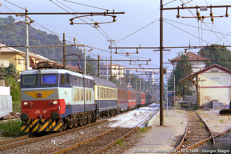 Stazione ferroviaria di Andora. In transito un treno internazionale trainato dalla locomotiva E.656.417. Da notare la linea di contatto aerea ex-trifase.